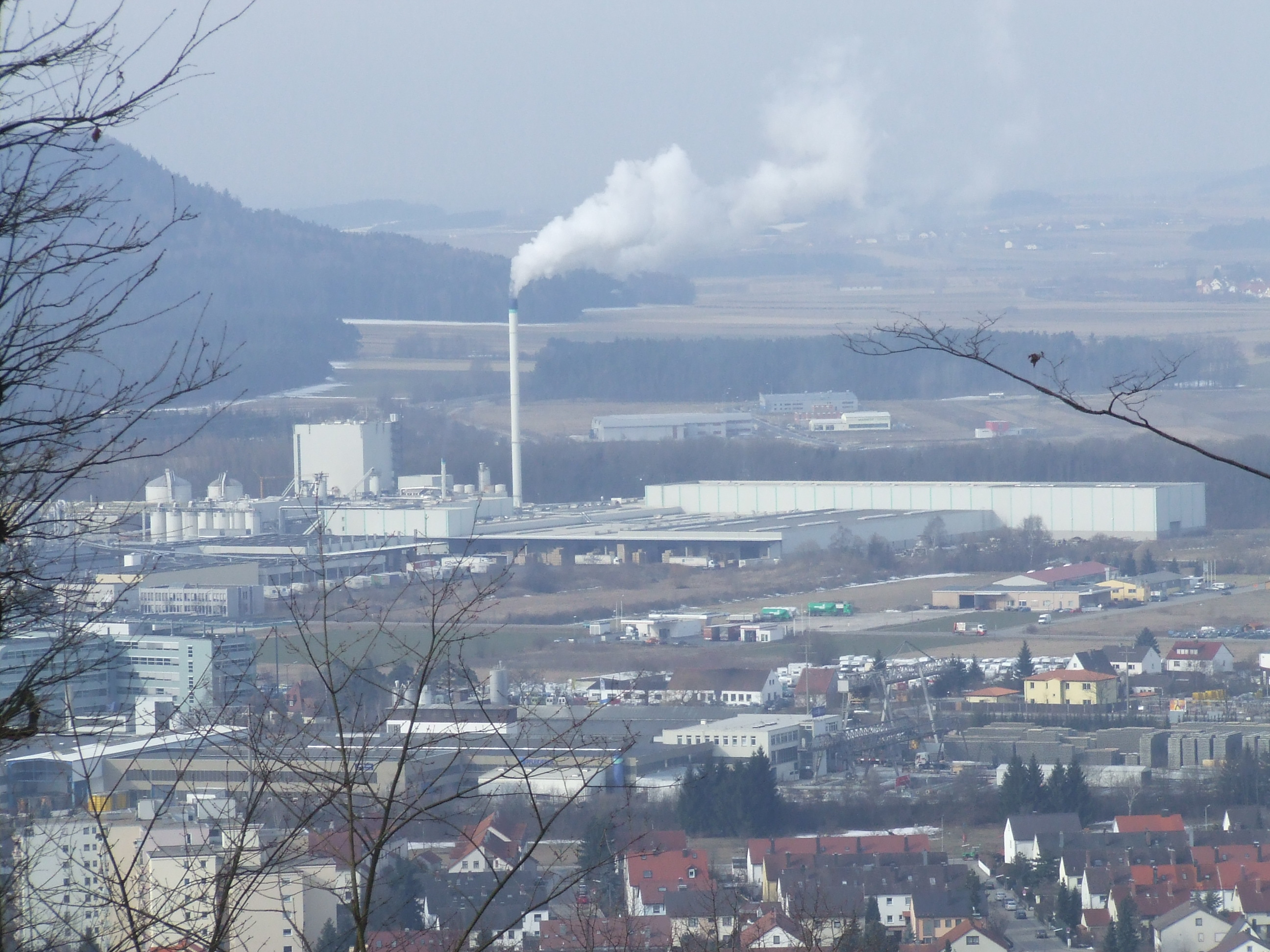 Stadt Neumarkt in der Oberpfalz, Hauptverwaltung der Pfleiderer AG (unteres Drittel, links)